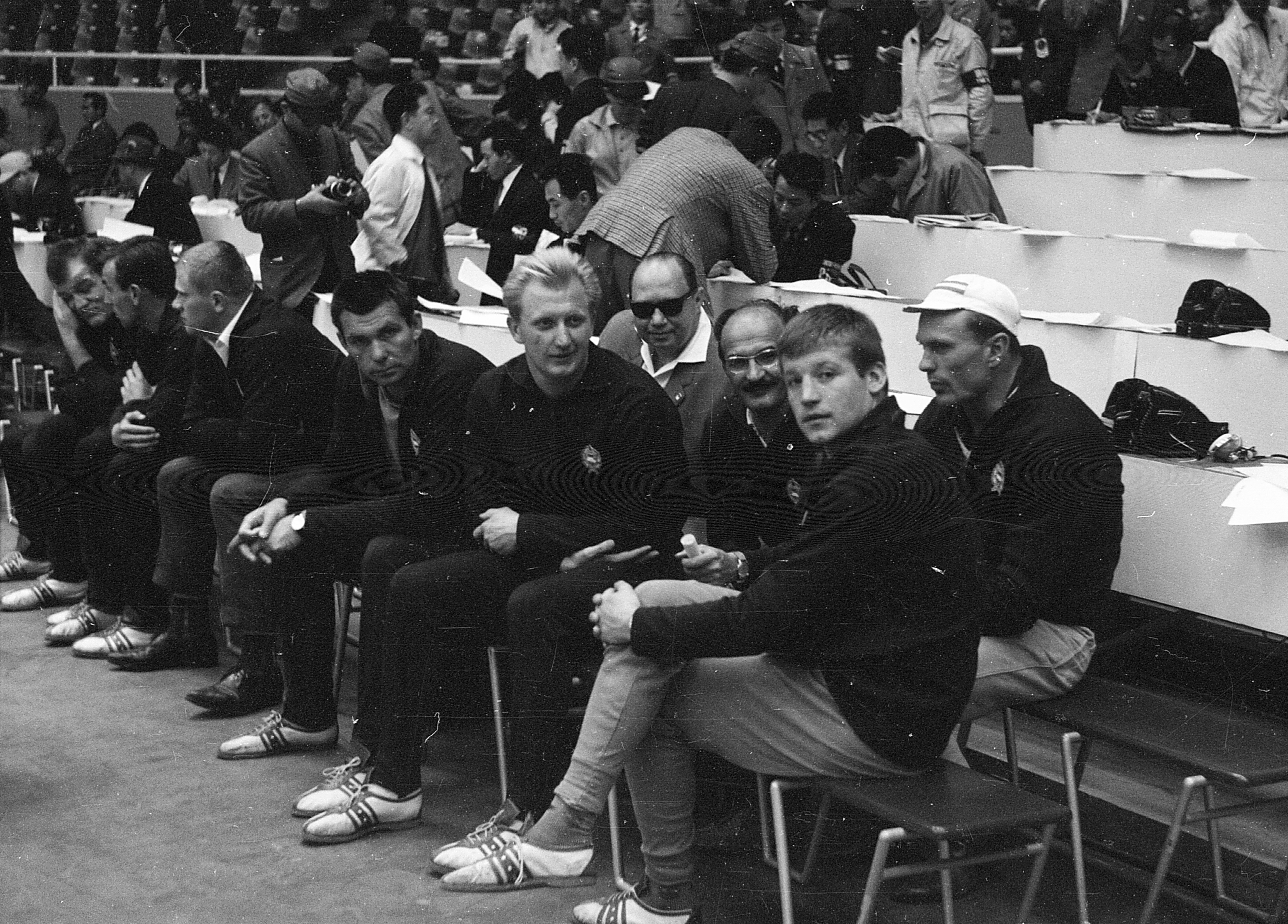 olimpia, magyar sportolók a nézőtéren. Elsö sor jobbról: Felkai László, Dömötör Zoltán, Boros Ottó, ?, Ambrus Miklós, ?. A második sorban jobbról a második Csőke József operatőr. Location: Japan, Tokyo Tags: Olympics, sportsperson Title: olimpia, magyar sportolók a nézőtéren. Elsö sor jobbról: Felkai László, Dömötör Zoltán, Boros Ottó, ?, Ambrus Miklós, ?. A második sorban jobbról a második Csőke József operatőr.